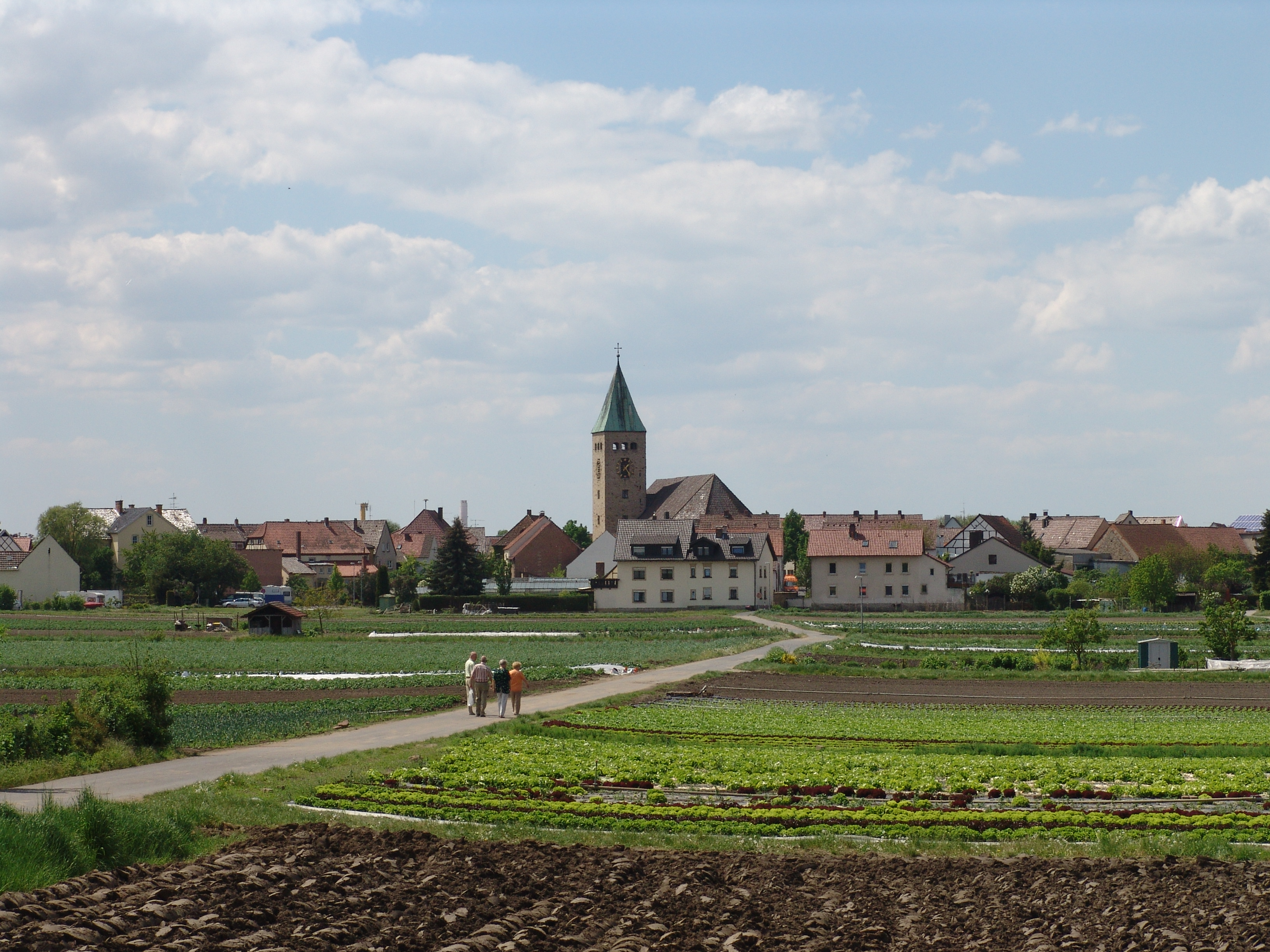 Sennfeld-von Osten